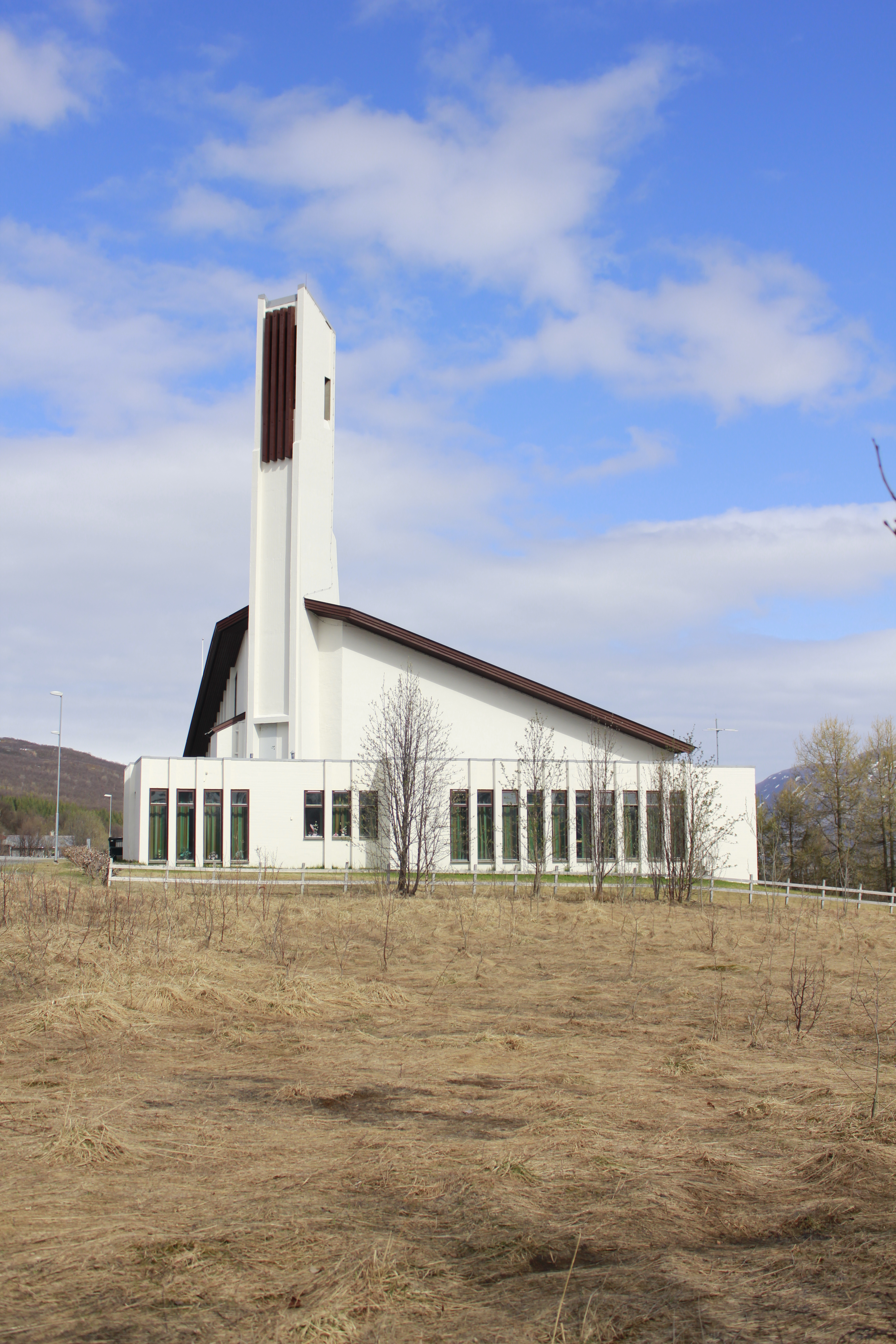 Ringvassøy kirke, Karlsøy kommune